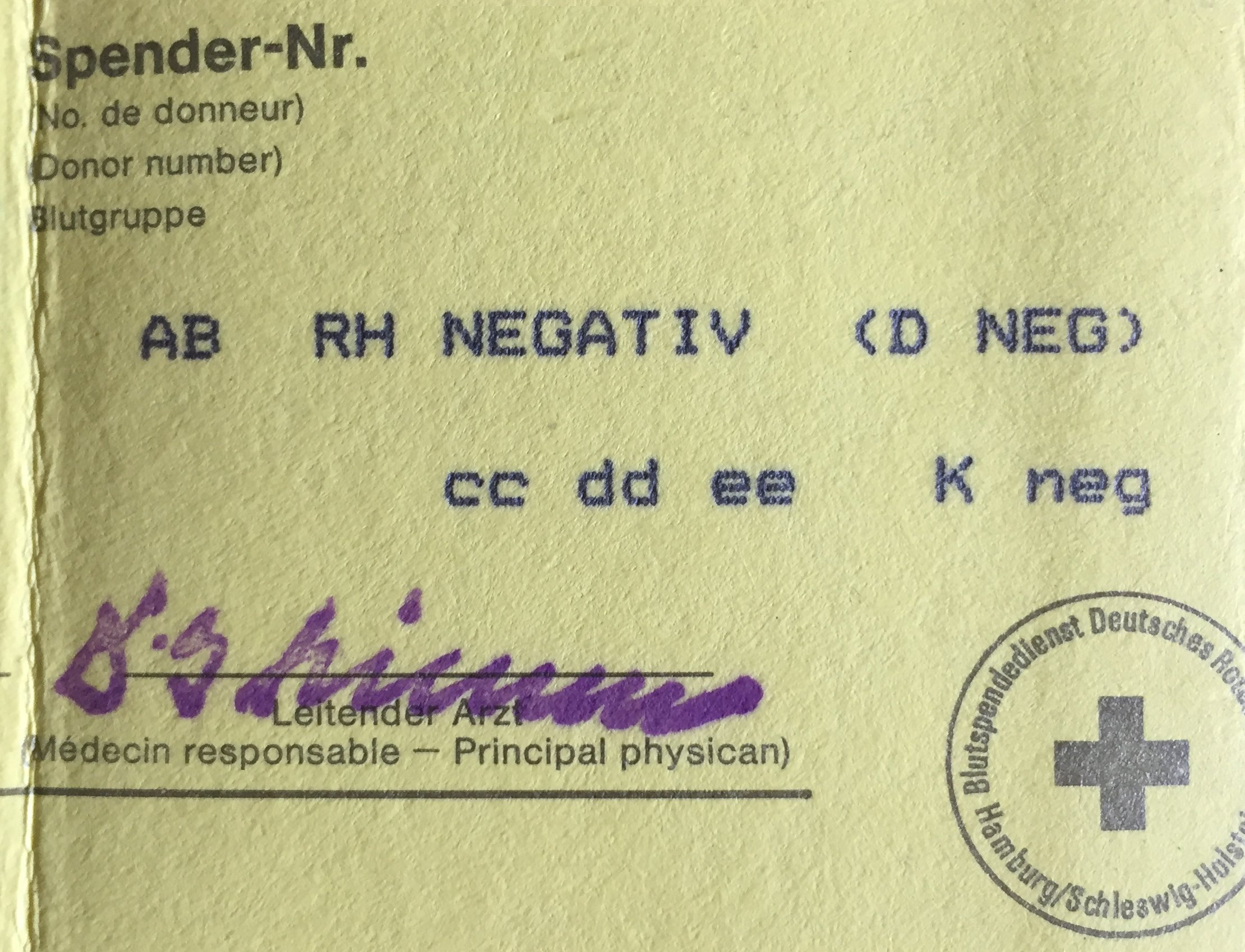 Blutgruppenangabe im Blutspenderpaß - AB rh